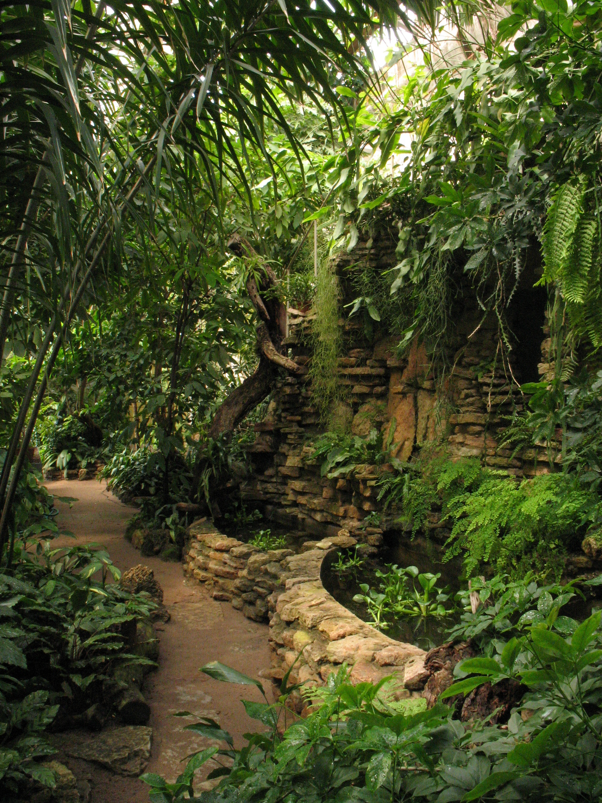 Ботанический сад РАН, тропическая оранжерея, декоративный грот